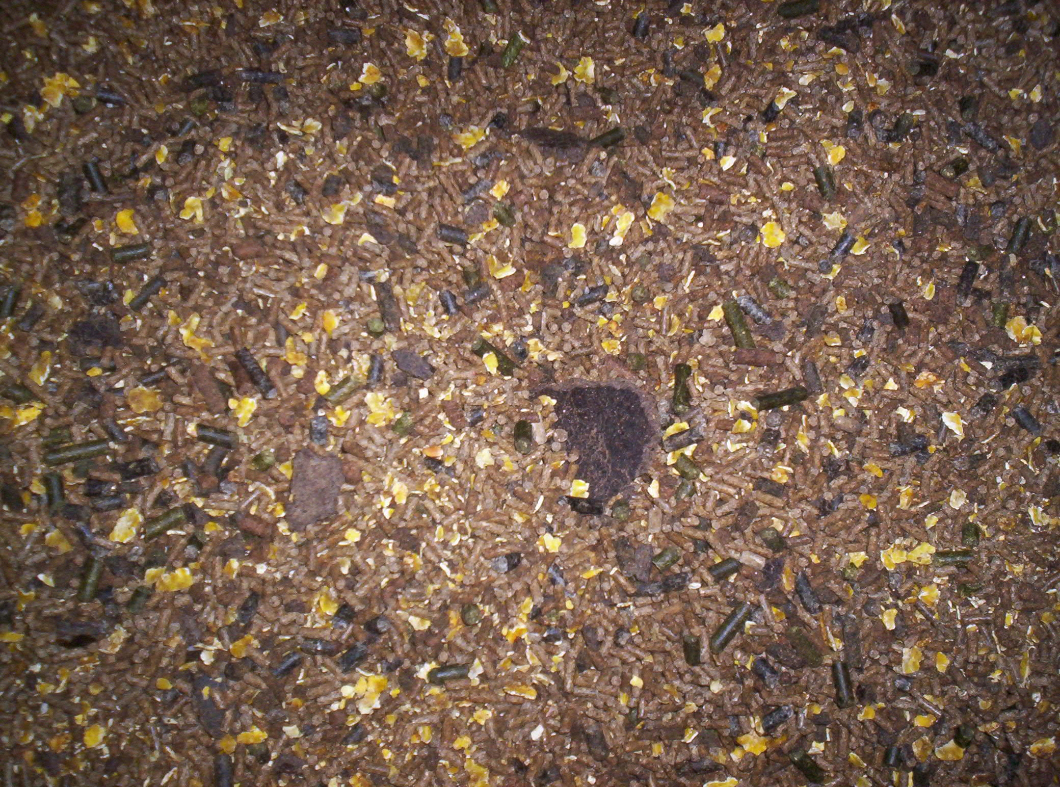 Aliment concentré pour bovins, mélange de granulés, de tourteaux et de grains de maïs aplatis.